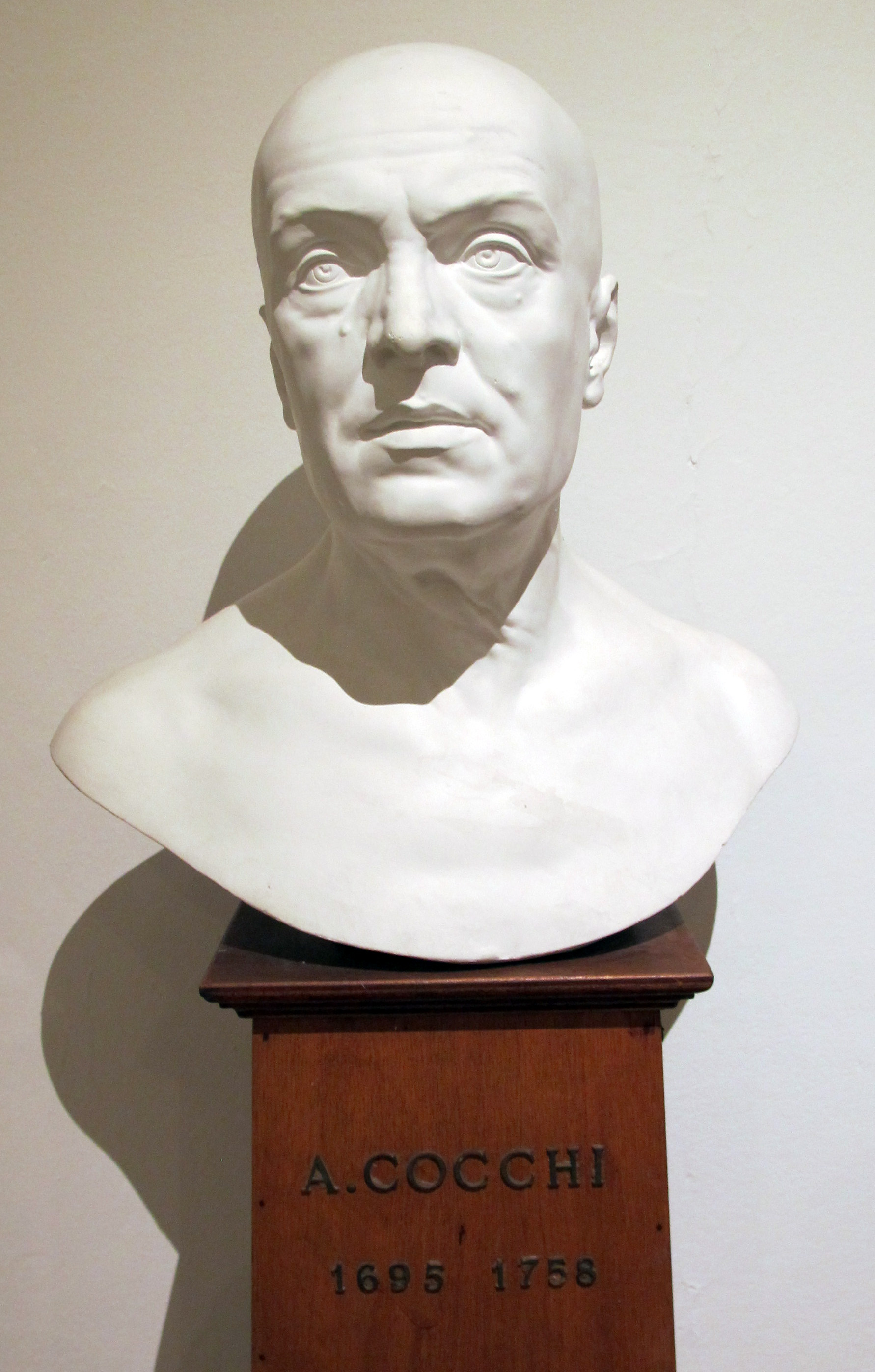 Istituto di anatomia patologica, museo, busto antonio cocchi